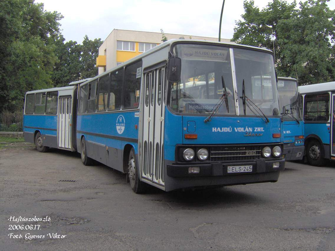 Ikarus 280-as busz Hajdúszoboszlón a Hajdú Volán színeiben (frsz. ELS-245)